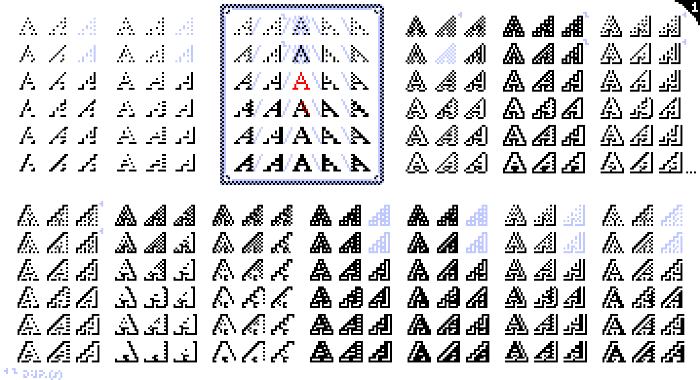 Figure 1. Les effets automatiques permettent de compléter les styles de texte qui ont été préalablement élaborés en pixel art (éventuellement dans un cataloque de polices, ou de familles de fontes bitmap). En se limitant à un A majuscule sérif (pixel art de 9×9 pixels mis en rouge), voici divers exemples en 1 bpp, d'obliques (simili-italiques) de 2 pixels, de gras (scriptés ou manuels – retouche pixel art également en rouge) et de trames (grisés) de 2 pixels, avant des détourages (de 1 pixel) et des masquages (multiples) simulant des profondeurs (via des sortes de calques z-index produisant des textures par pseudo-sérendipité). L'apparition d'un doublon obligerait à retoucher.